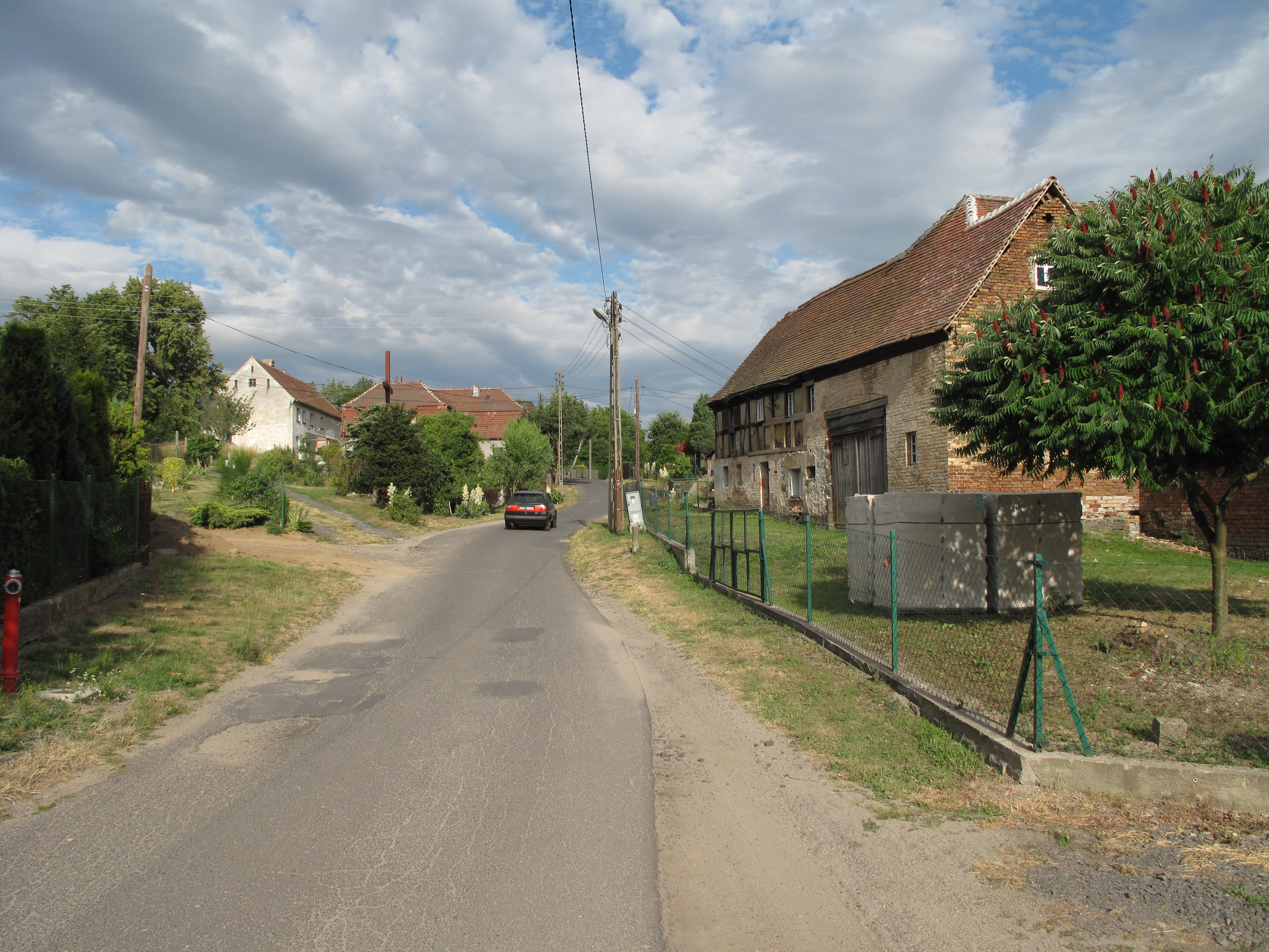 Wilka. Polska.